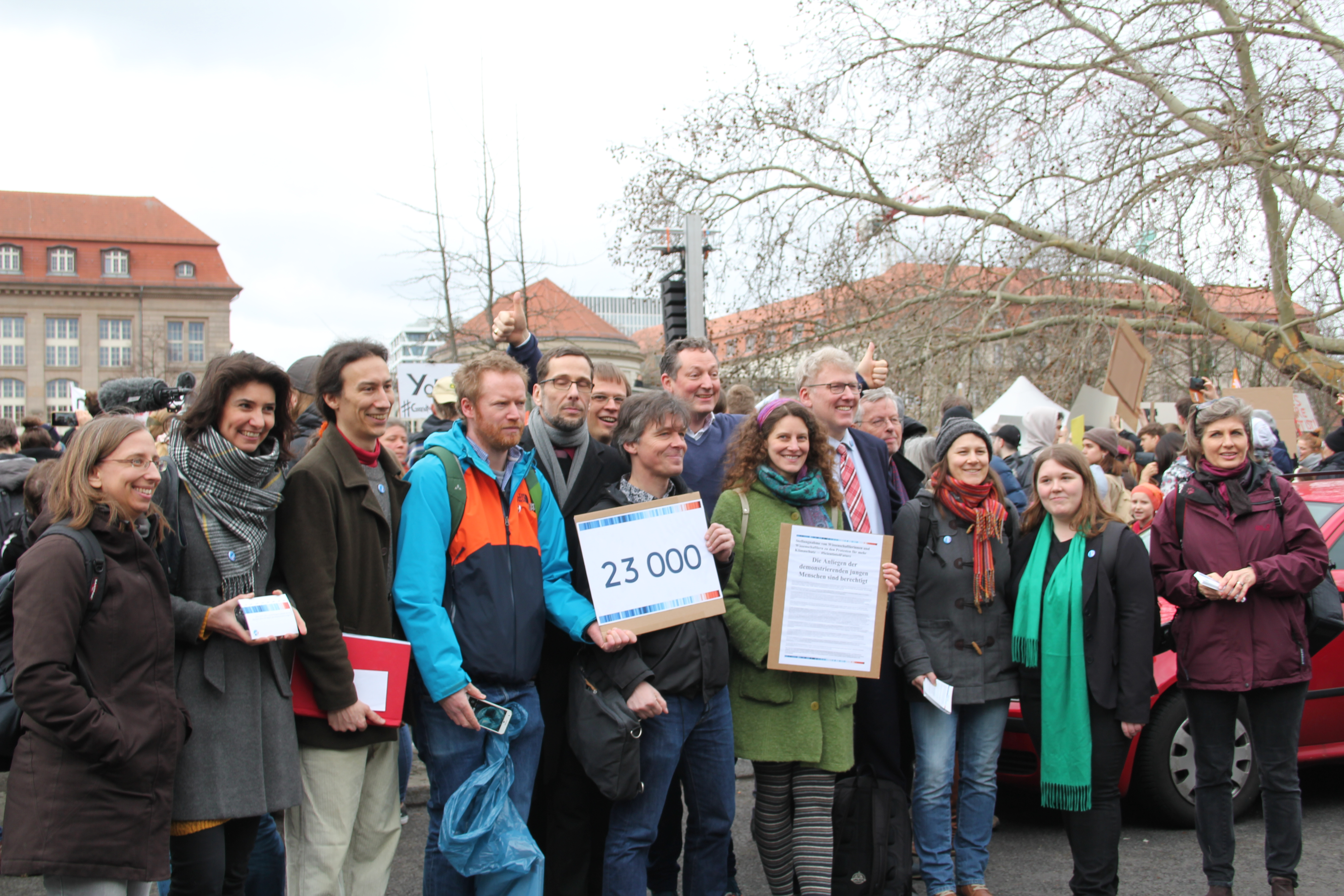 Organisatoren und Unterstützer der Scientists for Future am Rande der Friday For Future Demonstration. Die Klimademo fand am 15. März 2019 im Invalidenpark in Berlin-Mitte statt, im Hintergrund ist das Bundesministerium für Wirtschaft und Energie. Im Rahmen dieser Demonstration wurde bekannt gegeben, dass über 23.000 Wissenschaftlerinnen und Wissenschaftler die Forderungen der Schüler unterstützen.